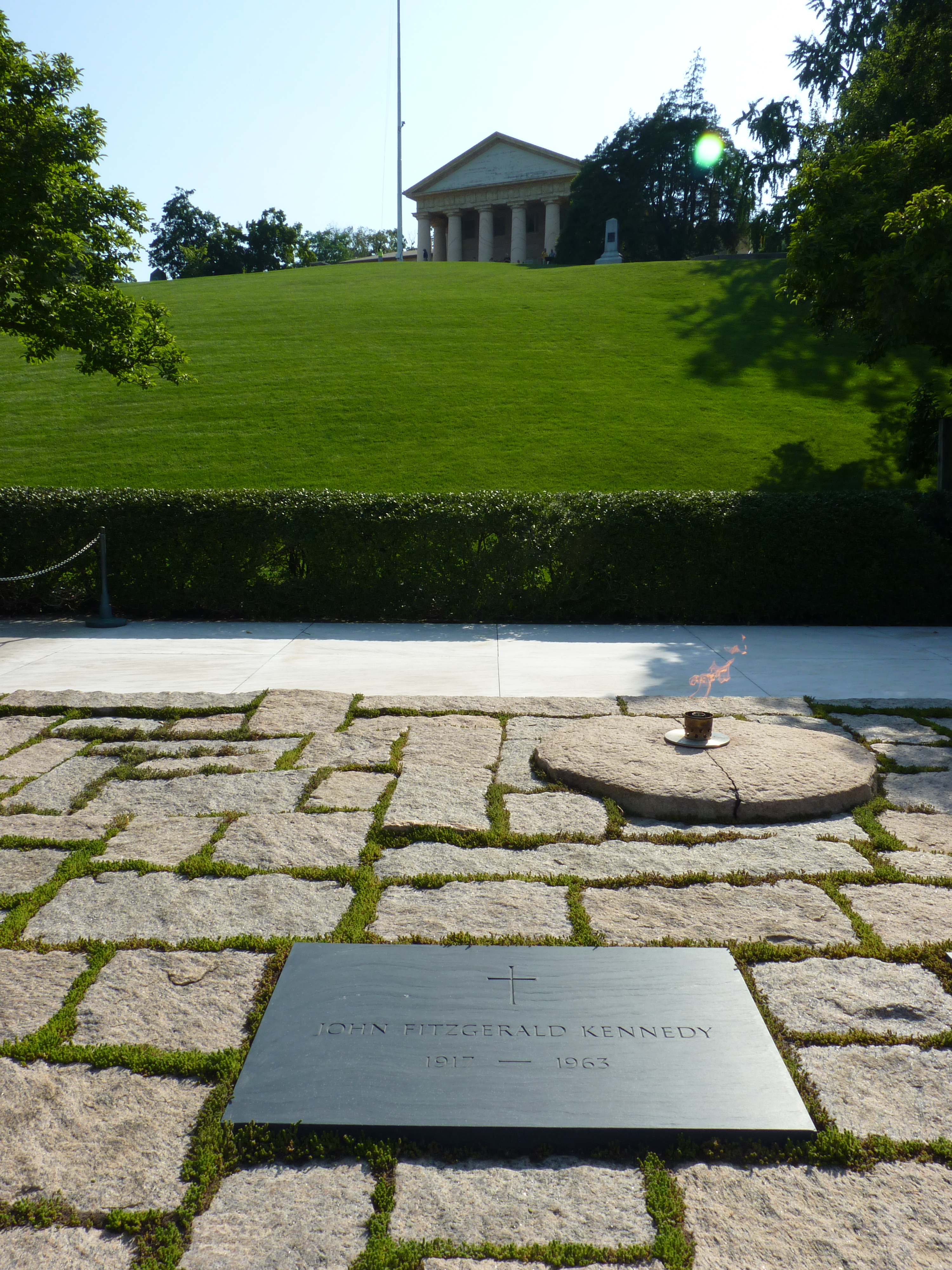 Pierre tombale de JFK au cimetière d'Arlington (Virginie)